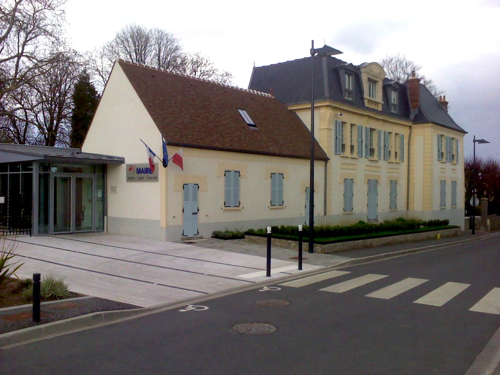 Hôtel de Ville d'Ollainville (91)